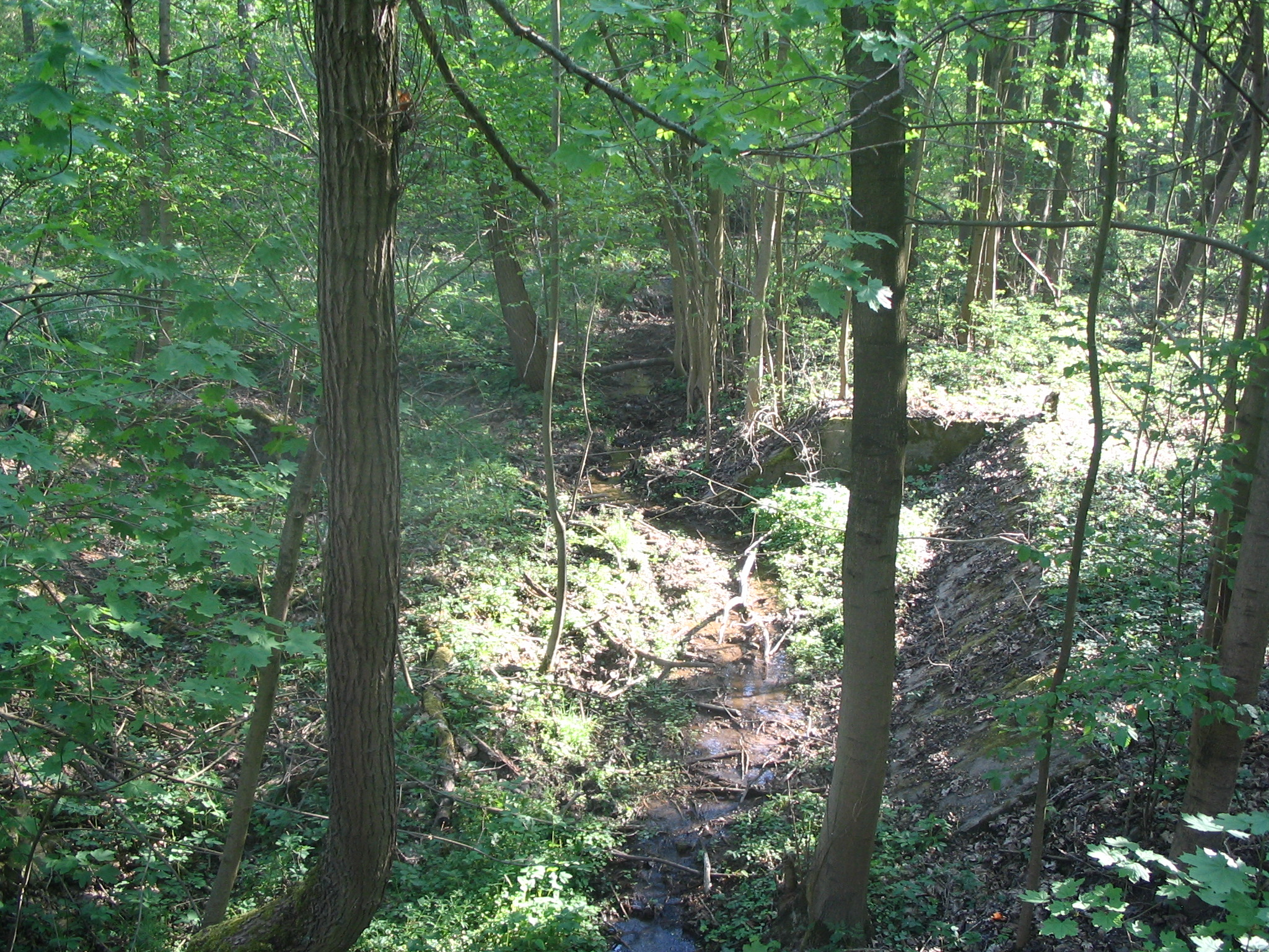 Šachetský potok